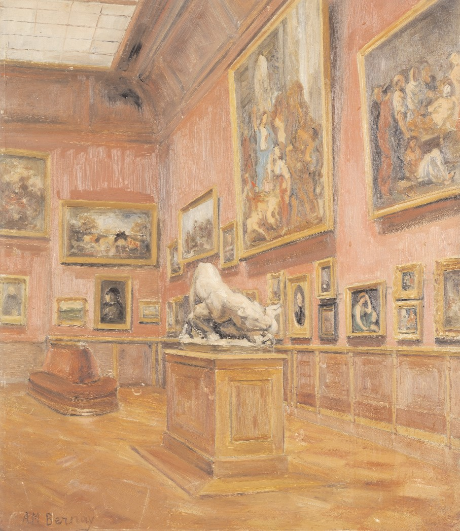 Peinture d'Anne-Marie Bernay représentant le Musée de Lyon